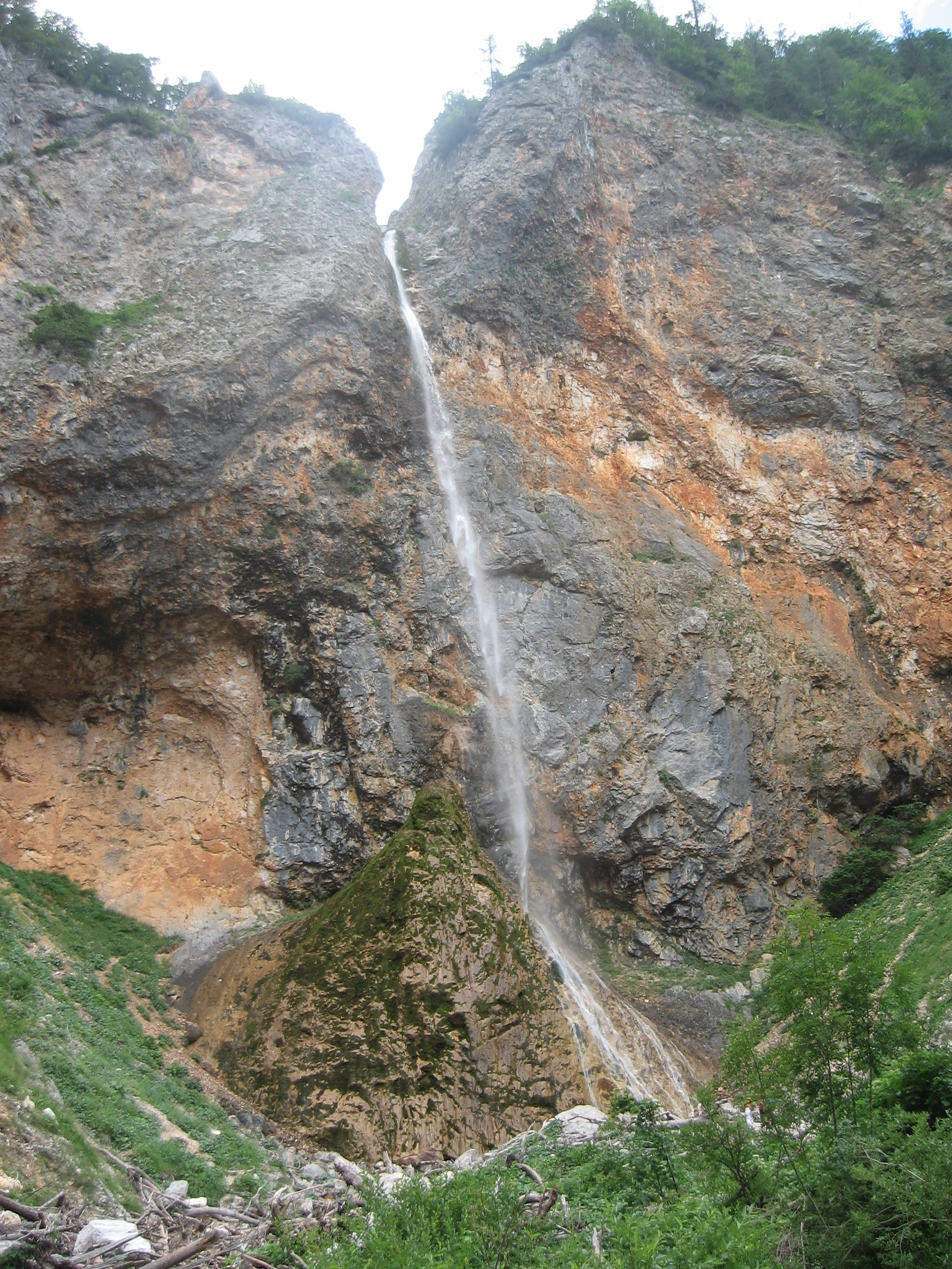 Slap Rinka, Slovenia, Rinka Waterfall